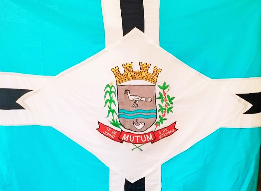 Bandeira de Mutum,MG